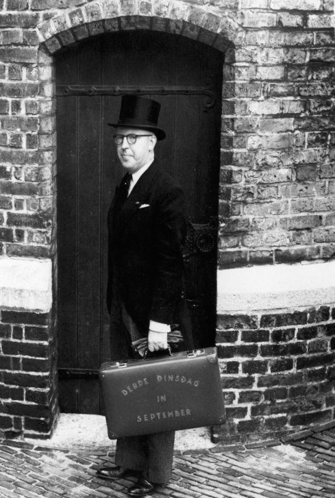 Minister Mr. Dr. P. Lieftinck met het koffertje van de "Derde dinsdag in September" voor de ingang, 19 september 1950.